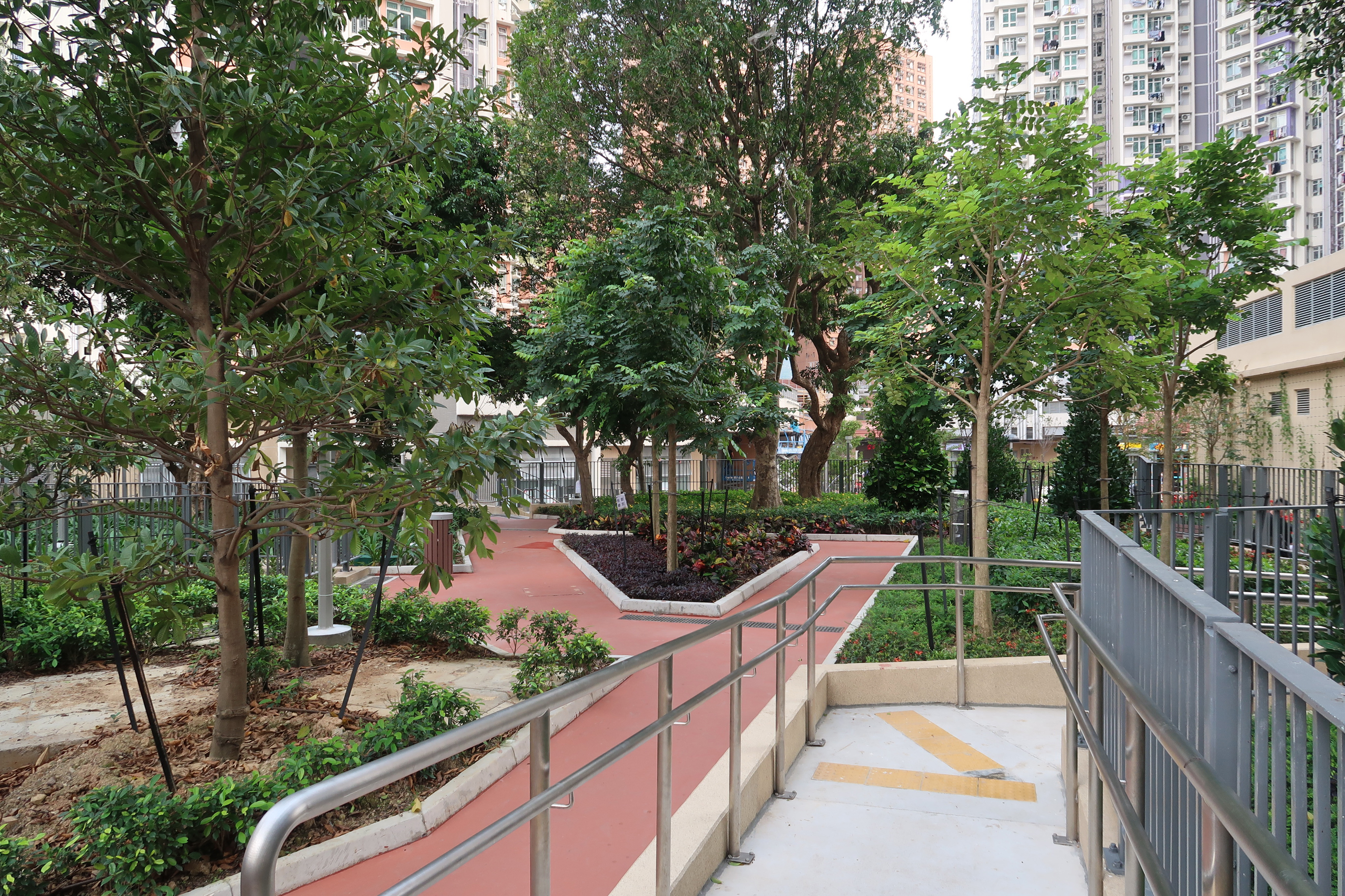 Yan Tin Estate Jogging Track